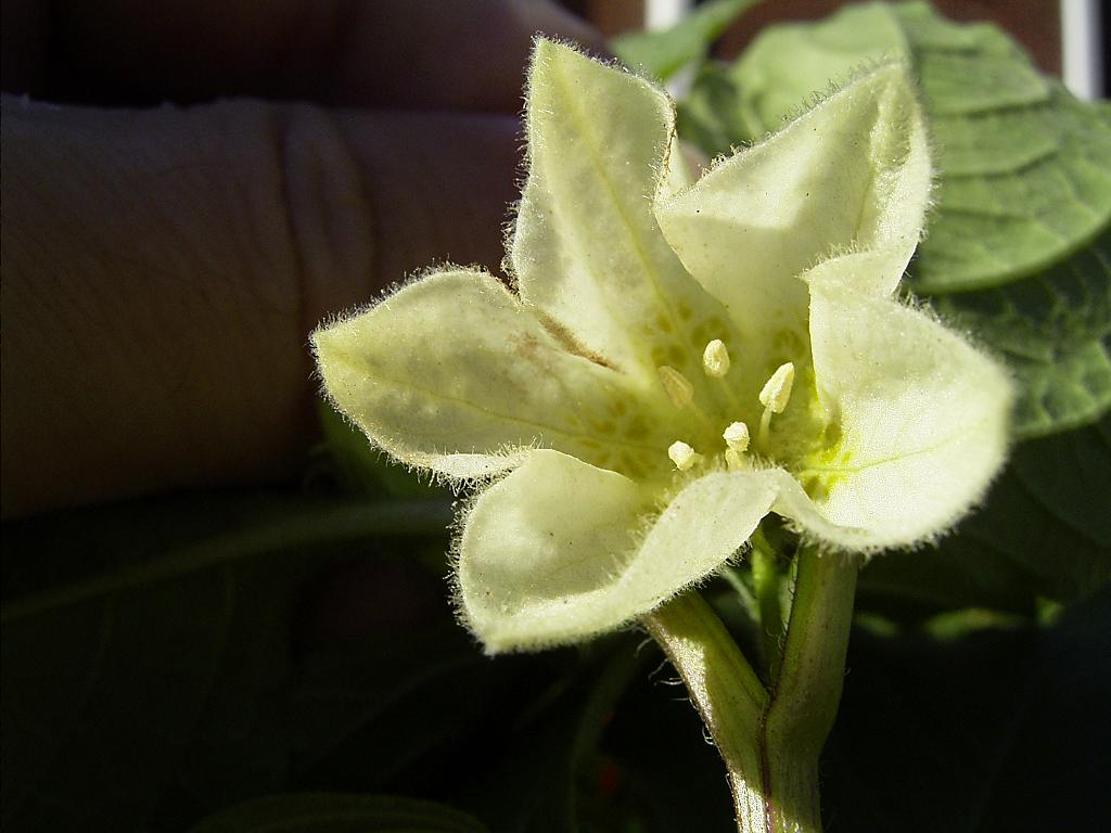 in de serie onze straat